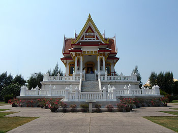 หอพระพุทธสิหิงค์มิ่งมงคลสิรินาถ